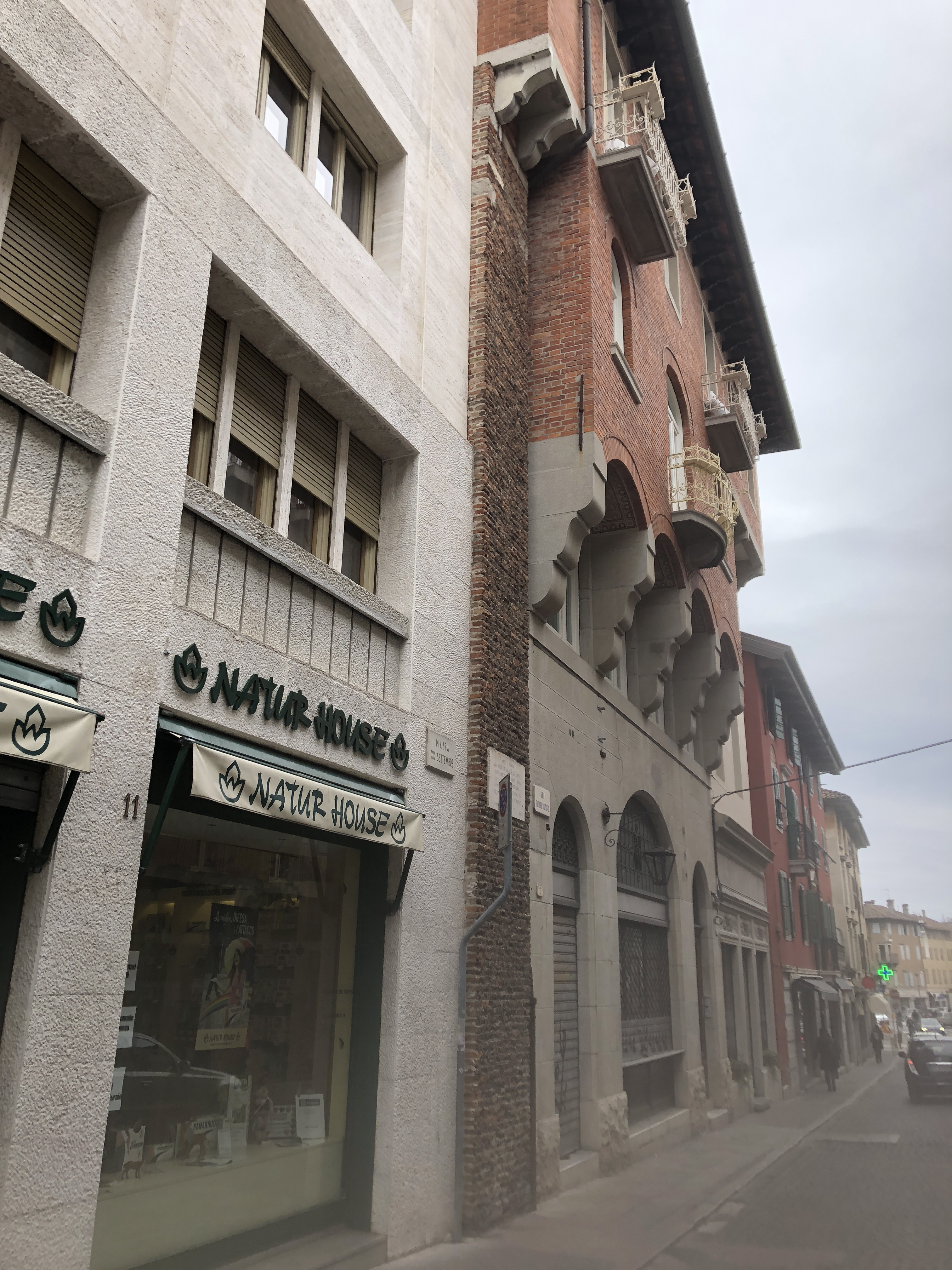 Porta Grazzano Interna